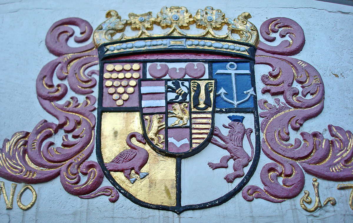 Wappen der früheren Reichsgrafen und heutigen Fürsten von Bentheim-Tecklenburg zu Rheda an der Neuen Mühle in Gütersloh This image shows a heritage building in Germany, located in the North Rhine-Westphalian city Gütersloh (no. A 151).